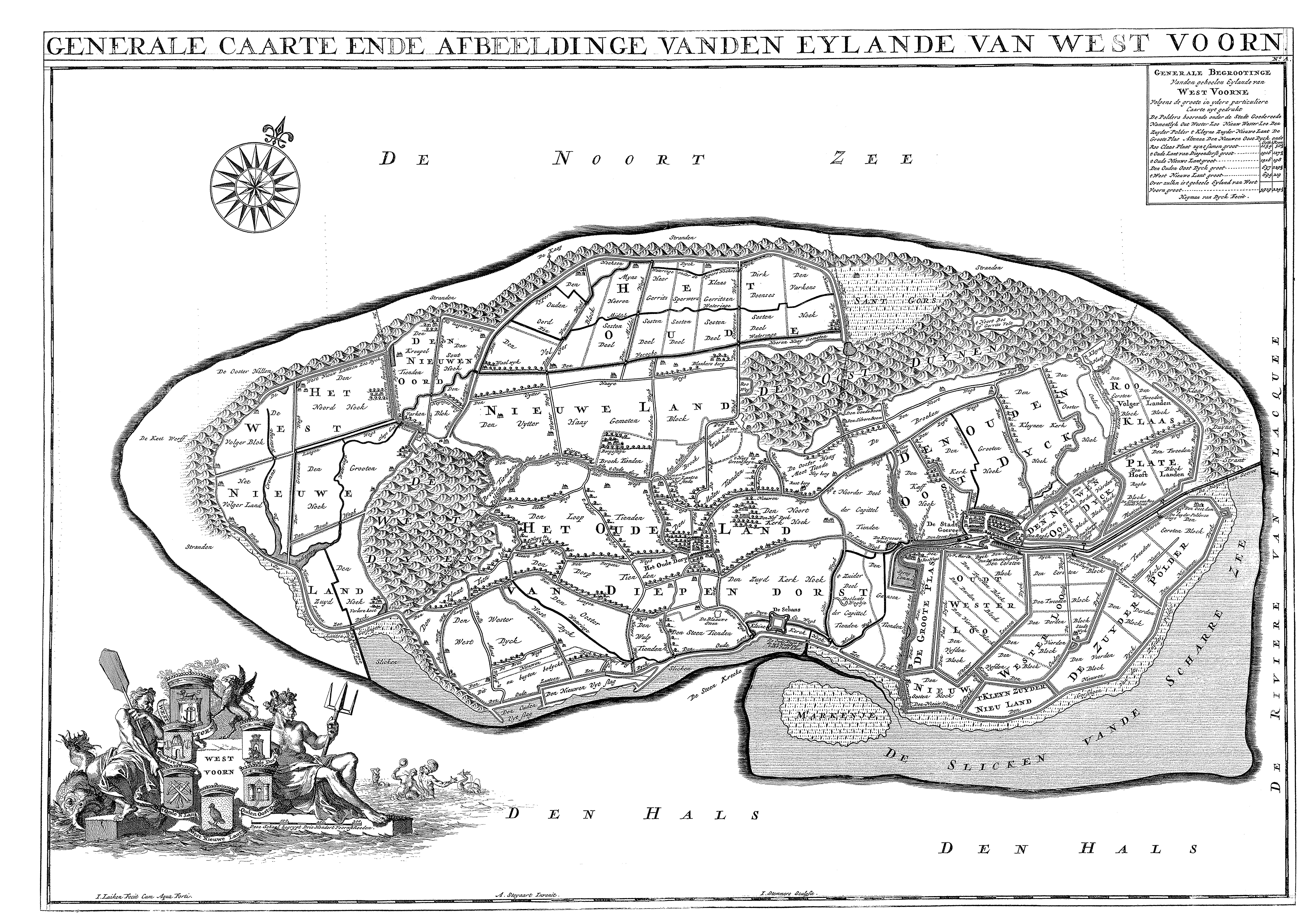 Scan van kaart in eigen bezit